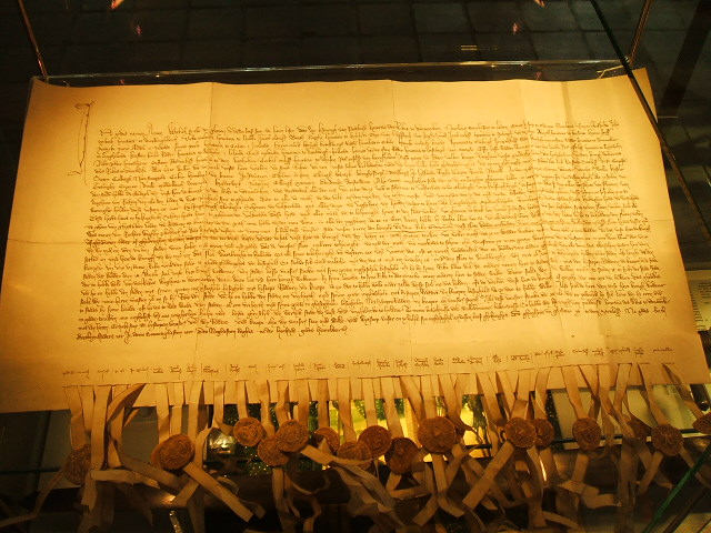 Das Foto zeigt Exponate im Kulturhistorischen Mseum in Stralsund in Stralsund im März 2007.